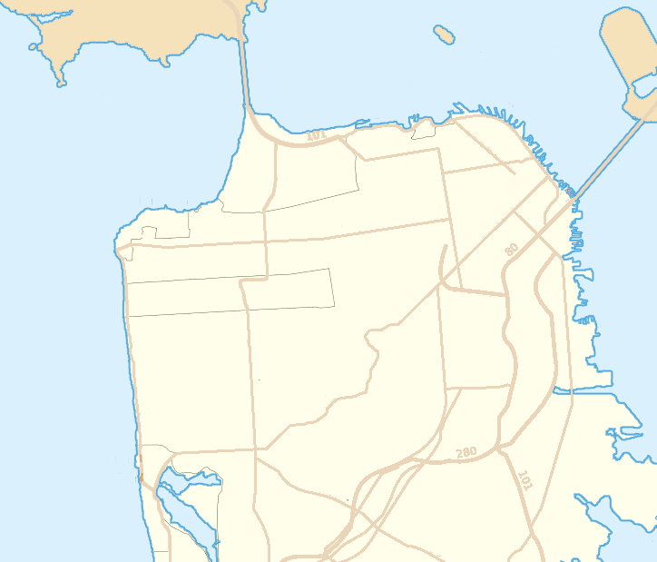 San Francisco location map